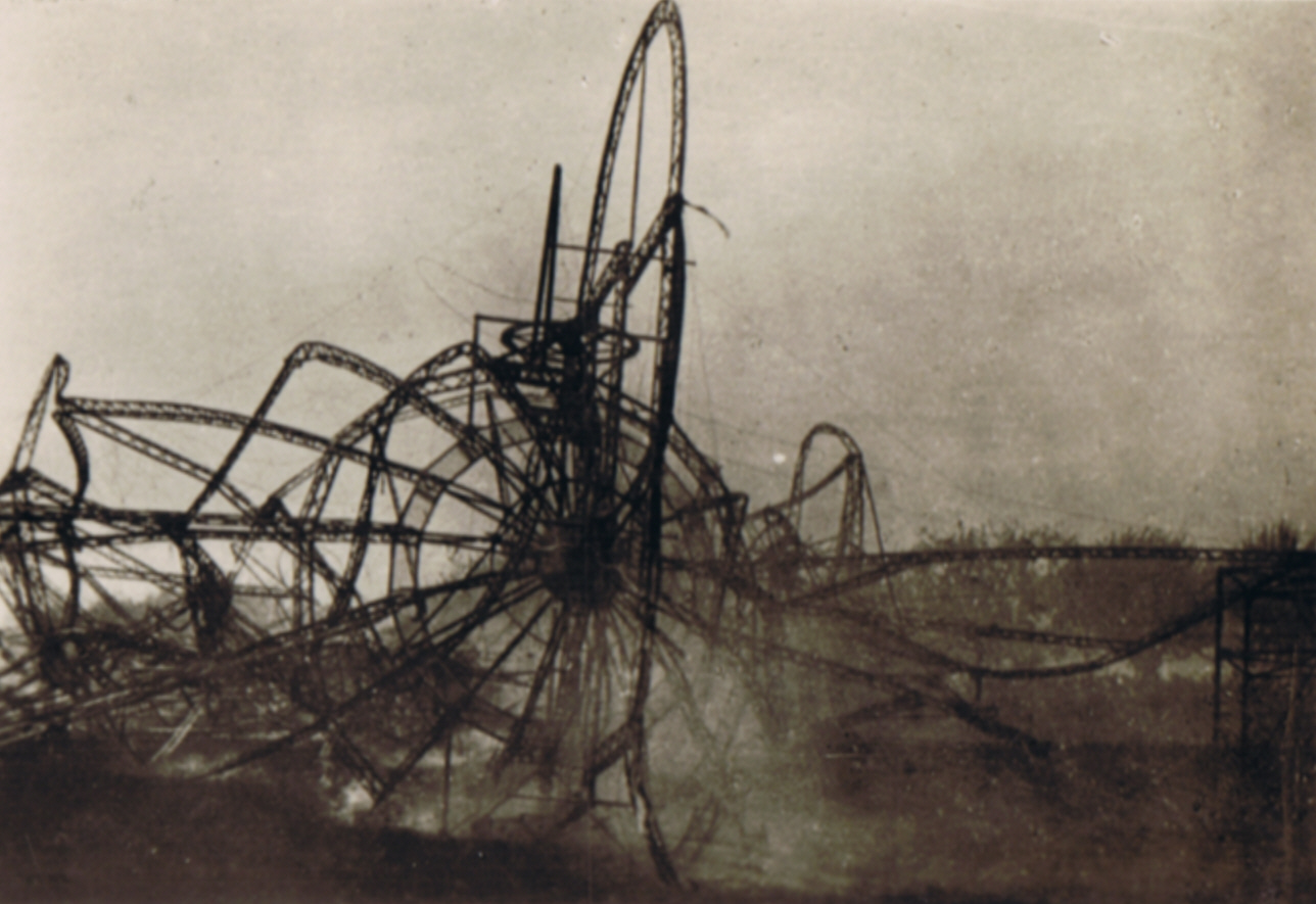 Nach einem Motorschaden zerstörtes LZ 4 bei Echterdingen am 5. August 1908